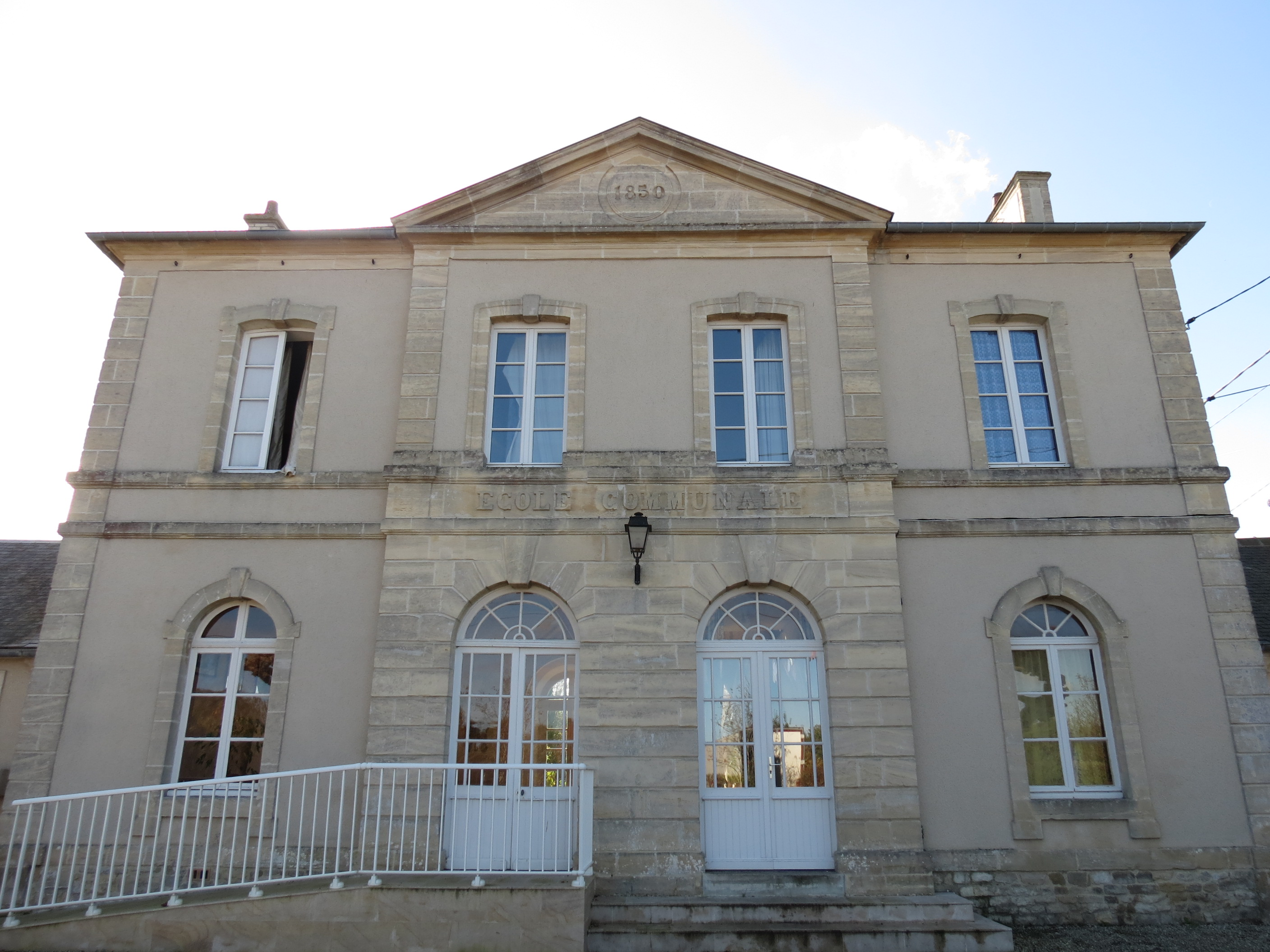 Mairie de Mosles, ancienne école communale bâtie en 1850